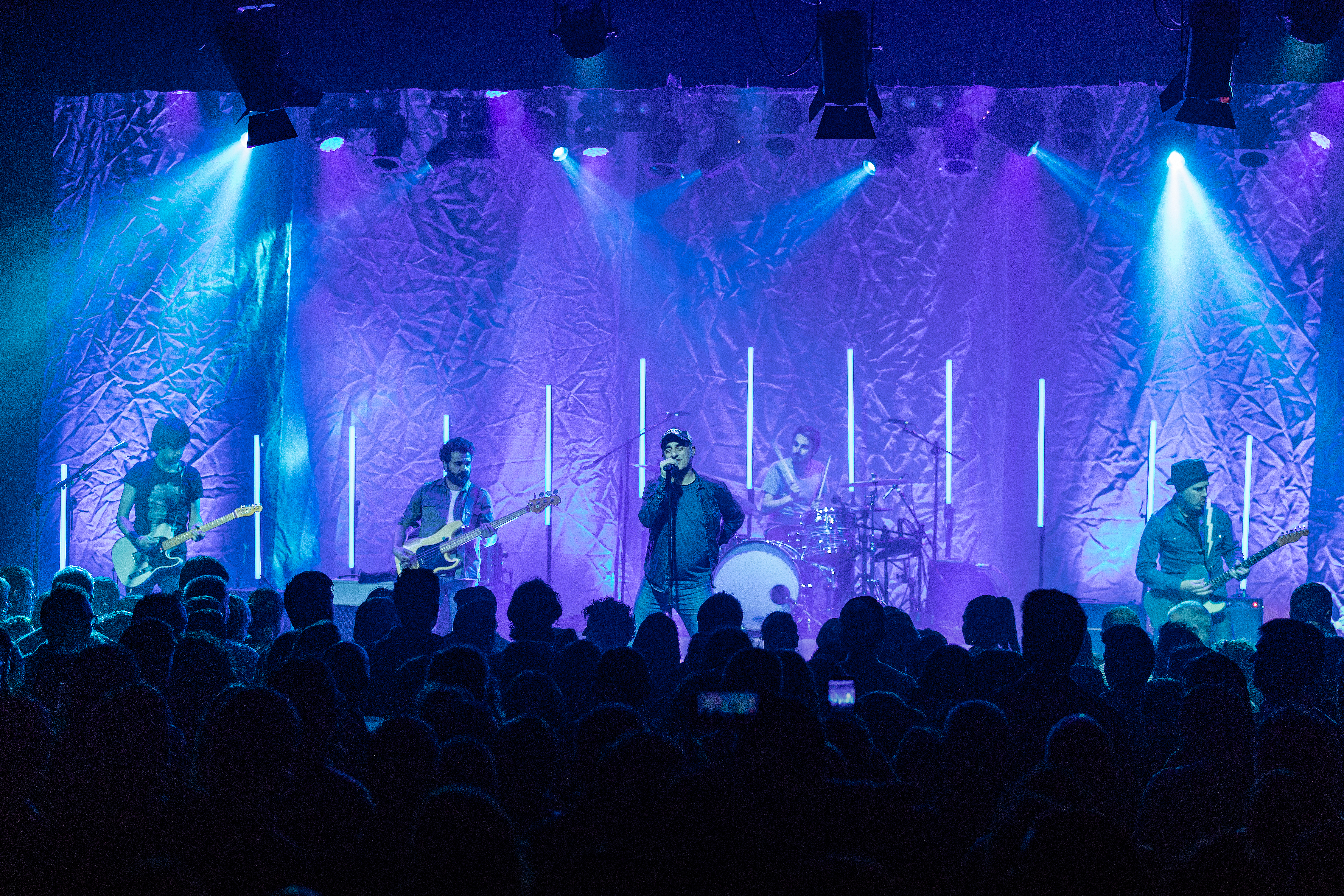 Dkluba Intxaurrondo, 2019/02/15 Argazkilaria/Fotógrafo: Josu de la Calle